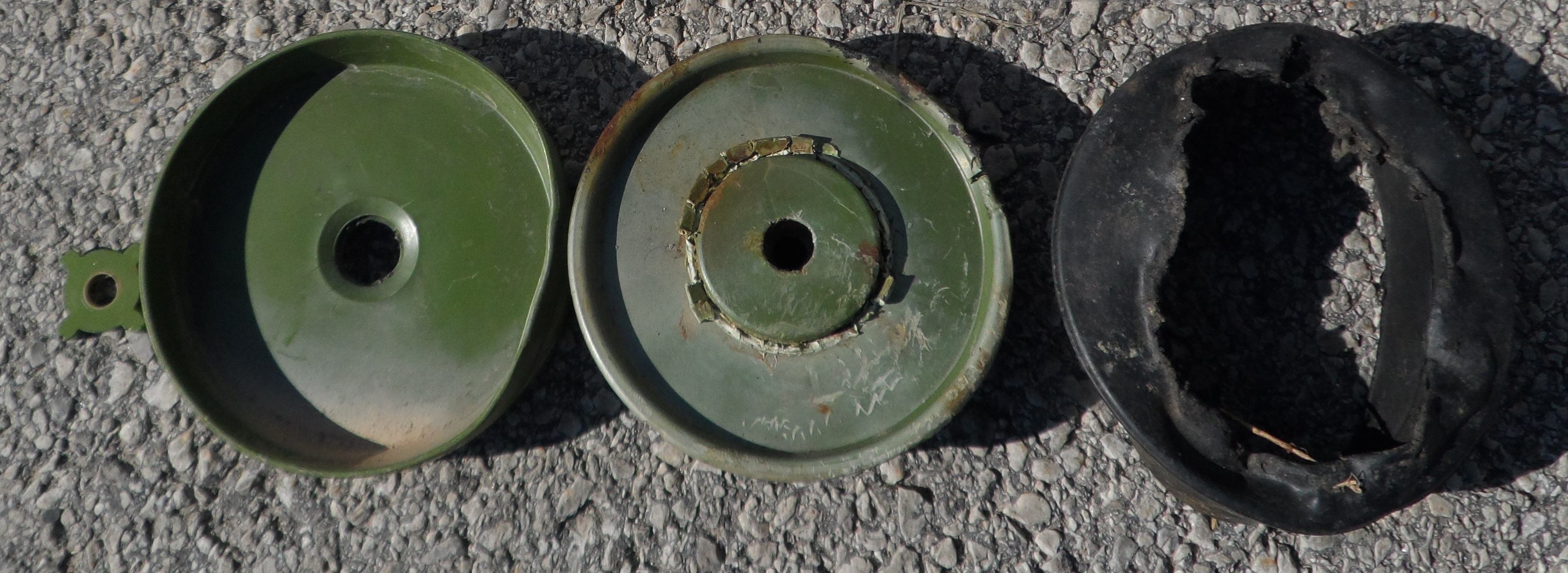 Mine PMA-3 auseinandergenommen mit Verletzungsmuster